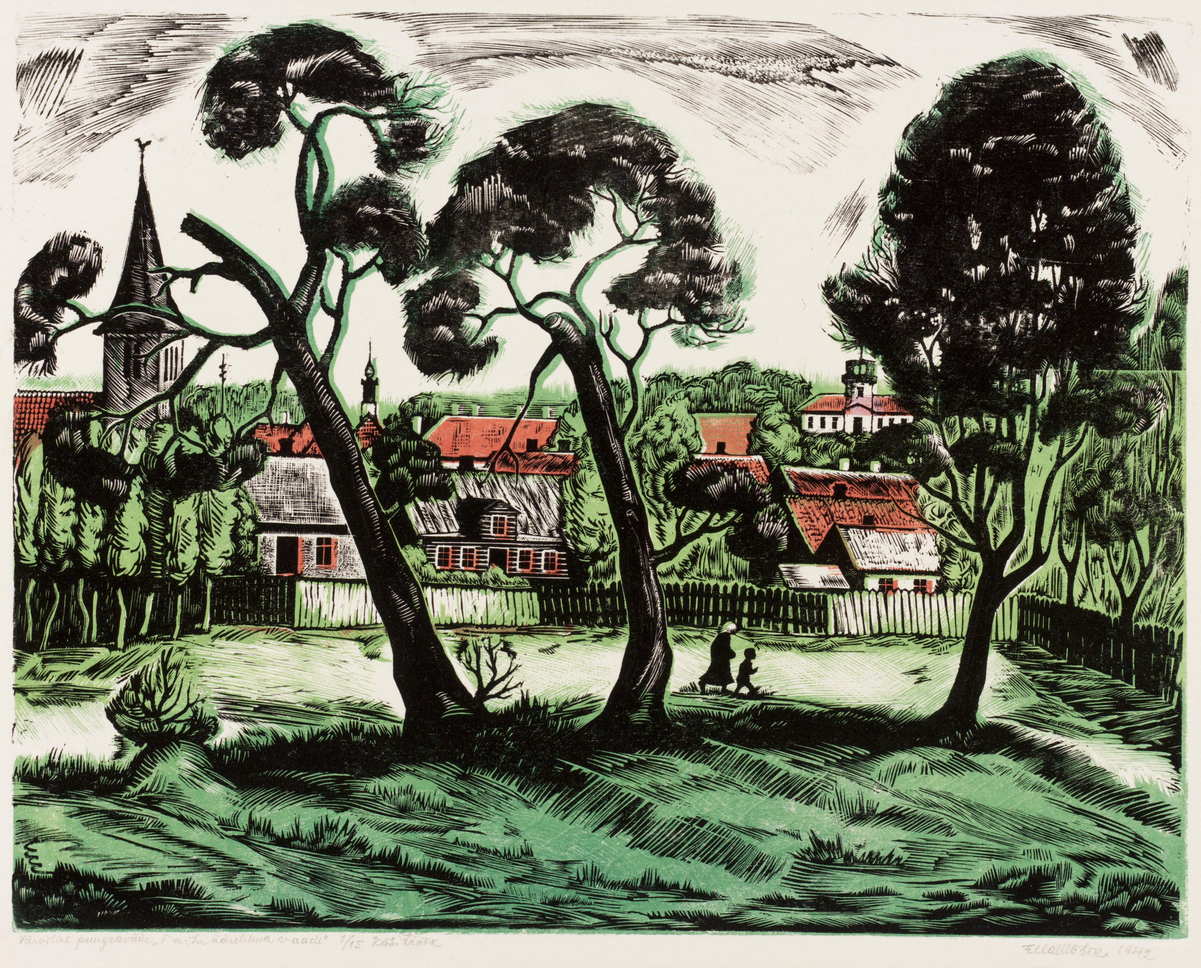 "Tartu äärelinna vaade". 1942. Värviline puugravüür, 1/15, käsitrükk. 25,1 x 32,3 cm. MUIS:TKM TR 5523 G 1611 This image on crowdsourcing geotagging platform Ajapaik